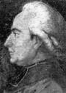 Portrait de Pierre-Louis de La Rochefoucauld, évêque de Saintes